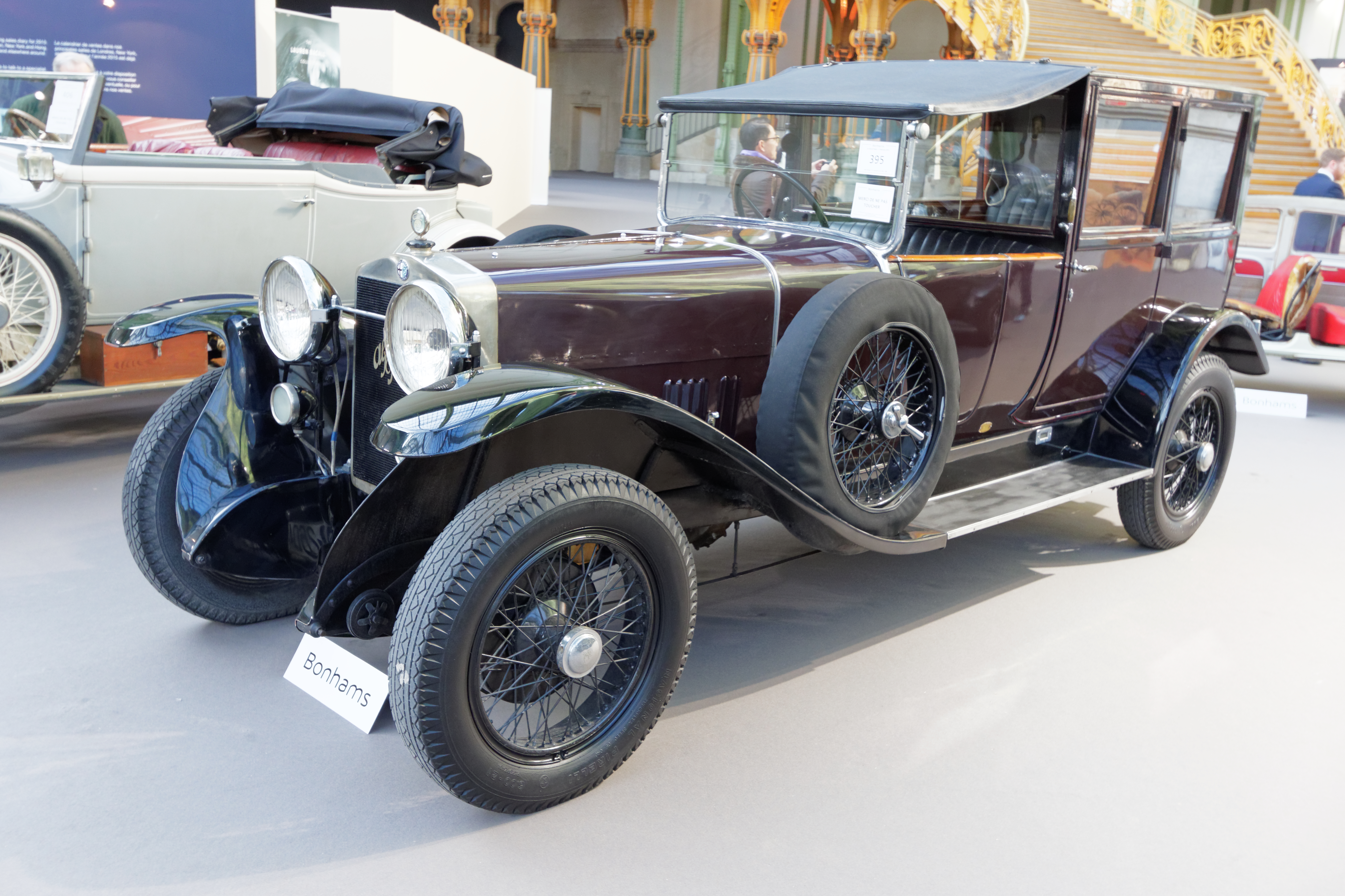 Un des véhicules présenté lors de la vente aux enchères Bonhams 2015 au Grand Palais de Paris.